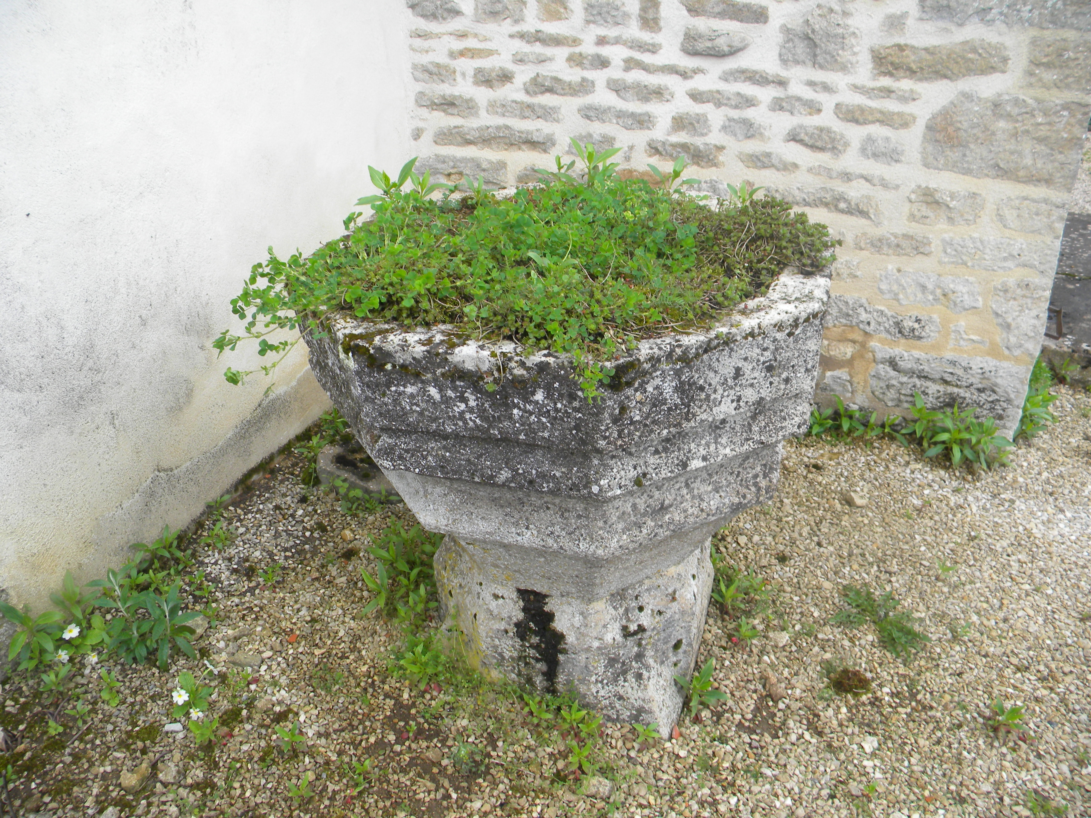 Bénitier